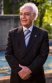 تقی ضرابی در چهارمین سال نوای موسیقی ایران ۲ آذر ۱۳۹۷ فرهنگسرای نیاوران